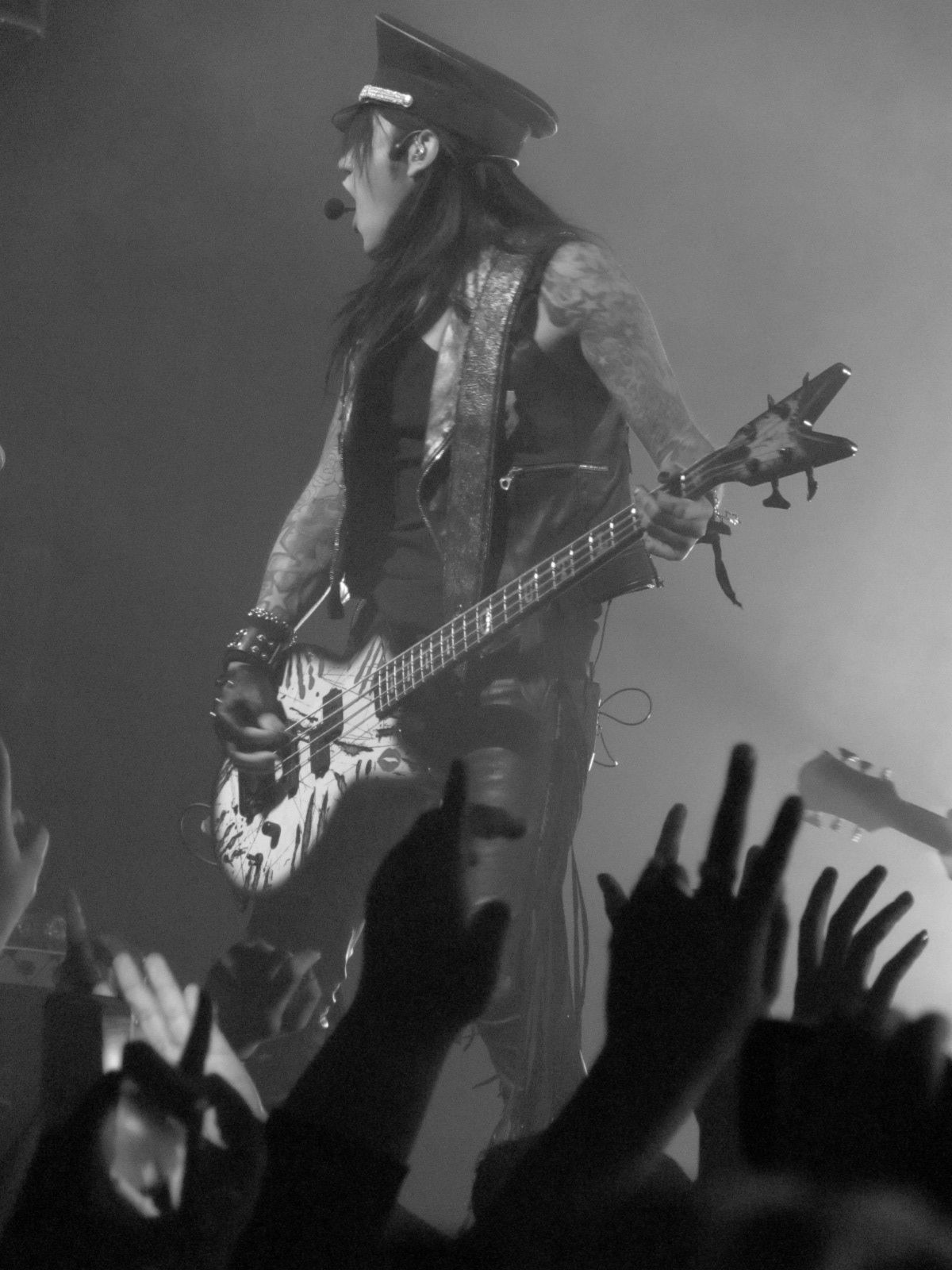 Concierto de la banda Black Veil Brides el 25 de enero de 2013 en Nueva York. En la imagen: Ashley Purdy.